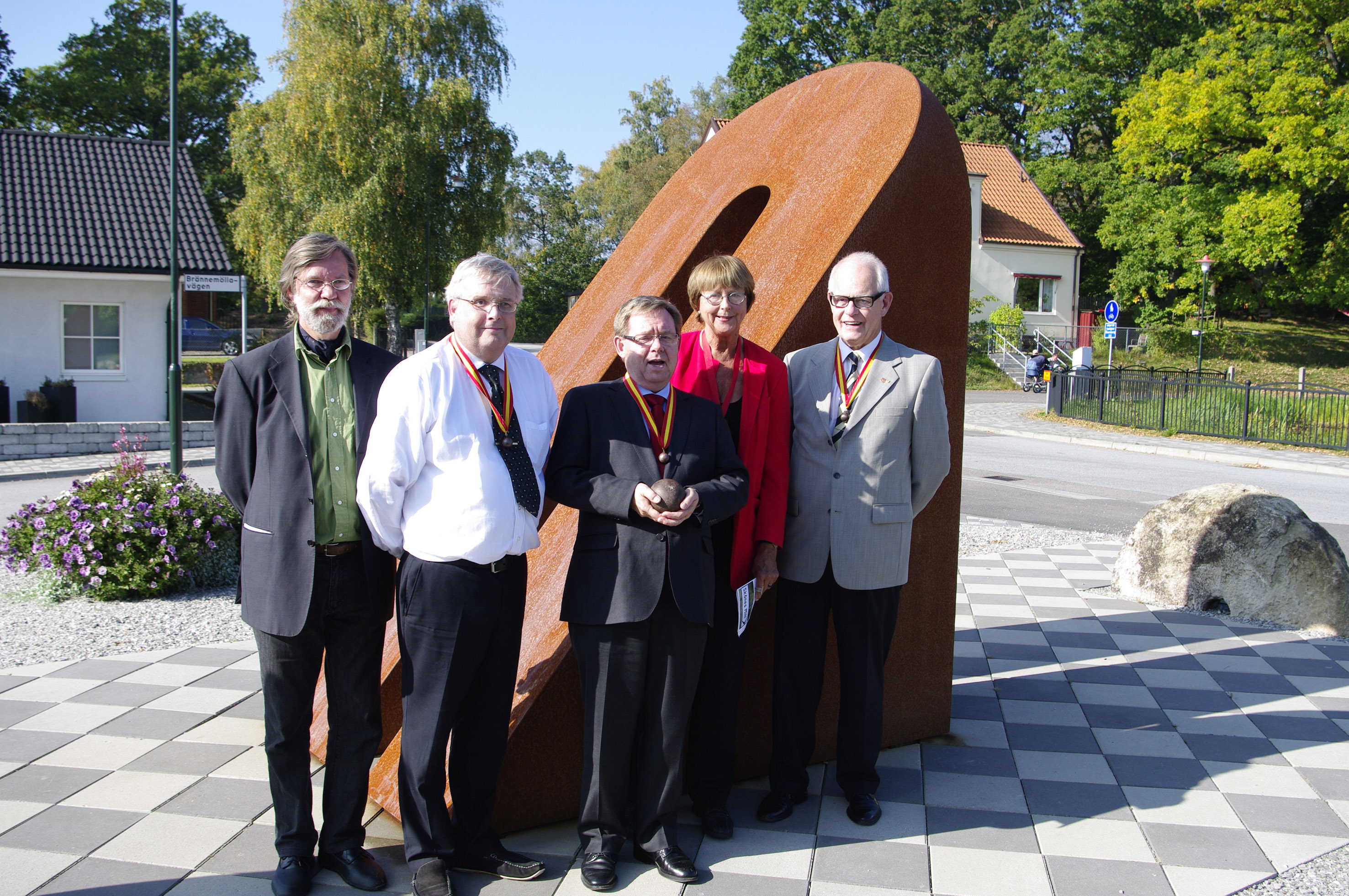 Pristagarna i Årets Medelpunkt 2010 och 2011, Höör, Sverige.